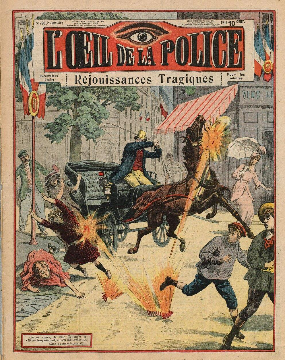 Magazine L'OEil de la police numéro 290 (340), dernier paru (fin juillet 1914).